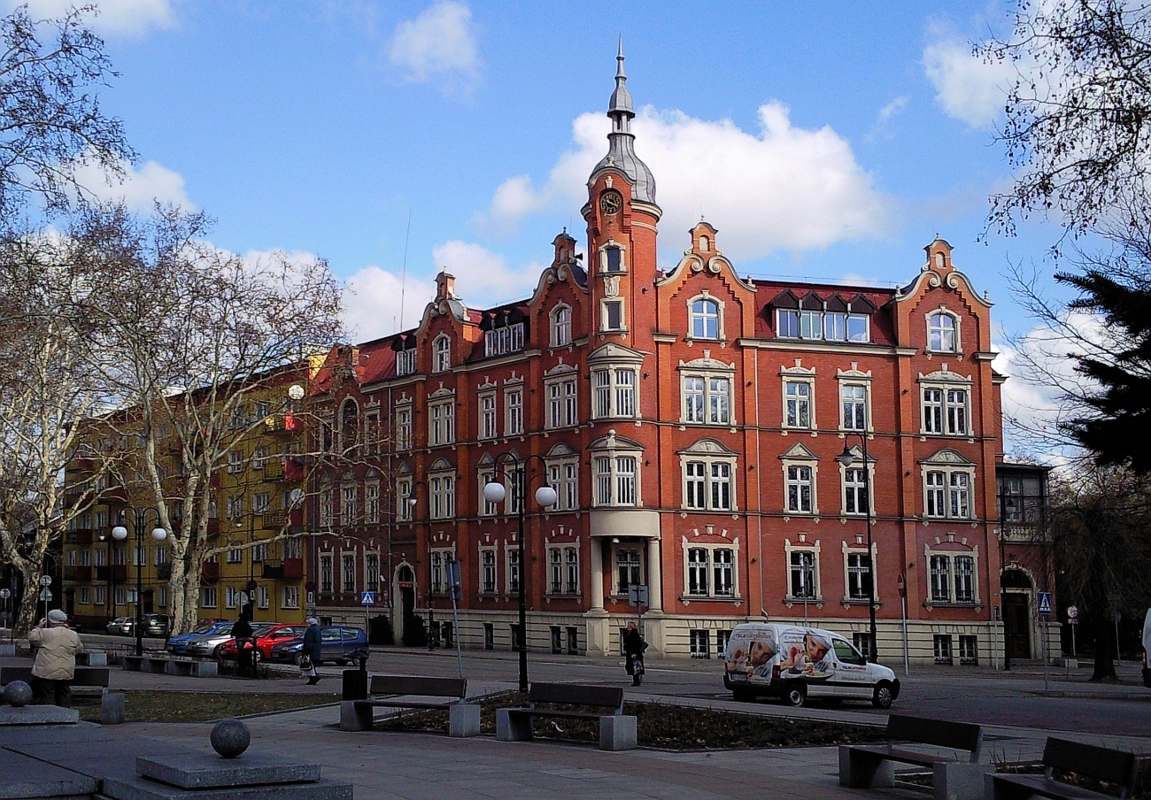 Urząd Miasta Siemianowice Śląskie przy ulicy Jana Pawła II